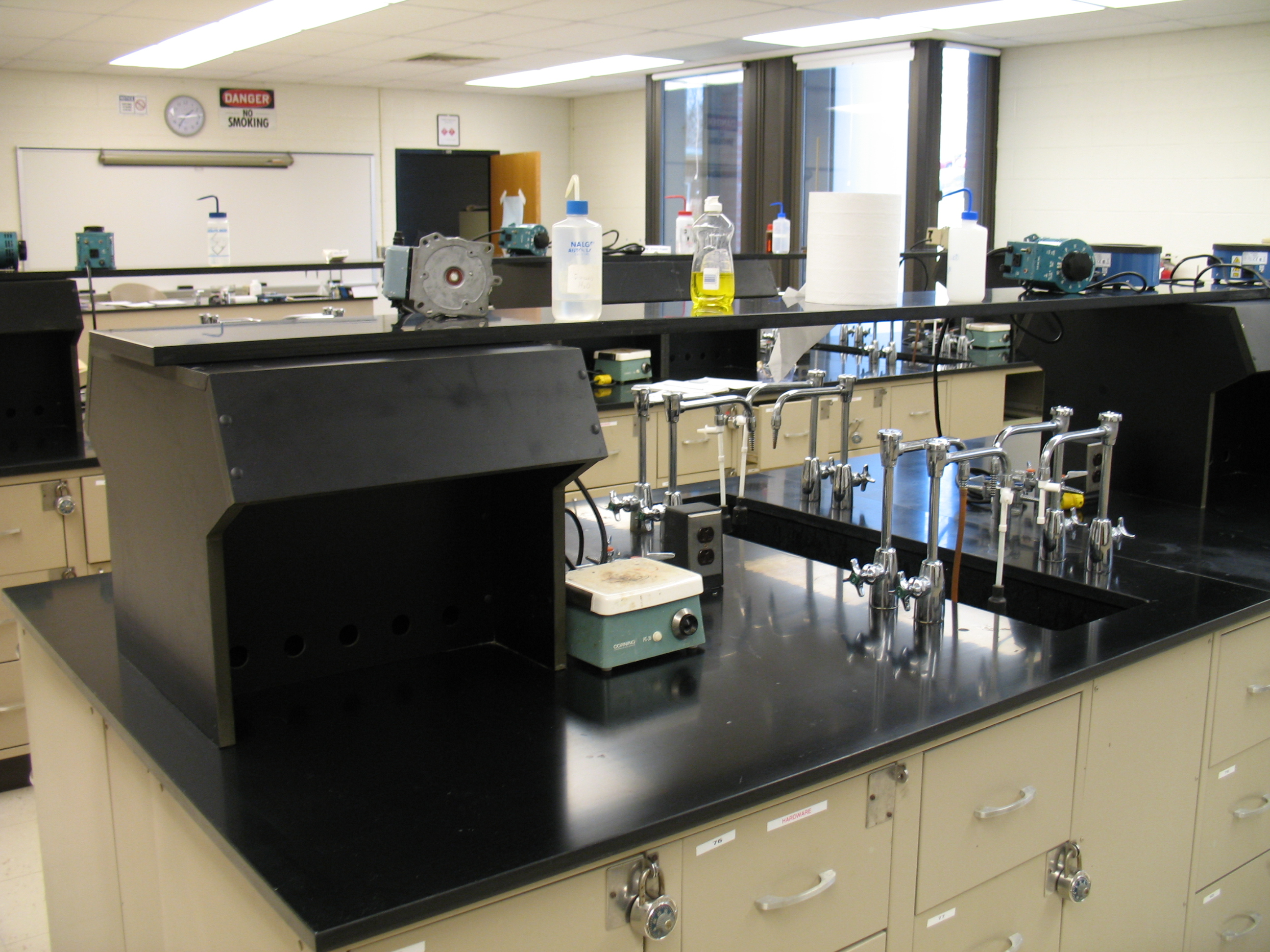 Studenckie stanowiska laboratoryjne w pracowni chemicznej na amerykańskim uniwersytecie "University of Pittsburgh-Greensburg".